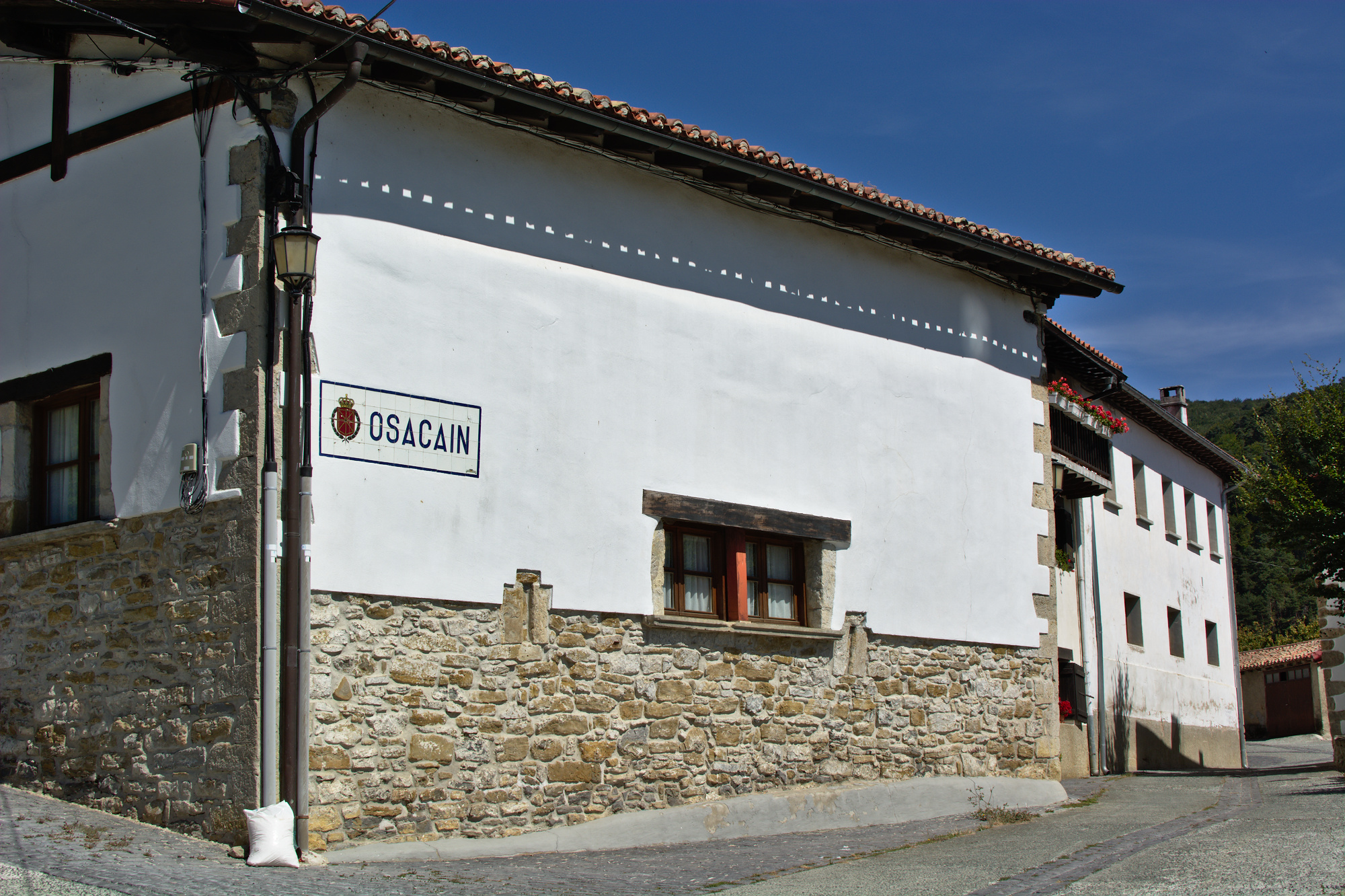 Oláibar